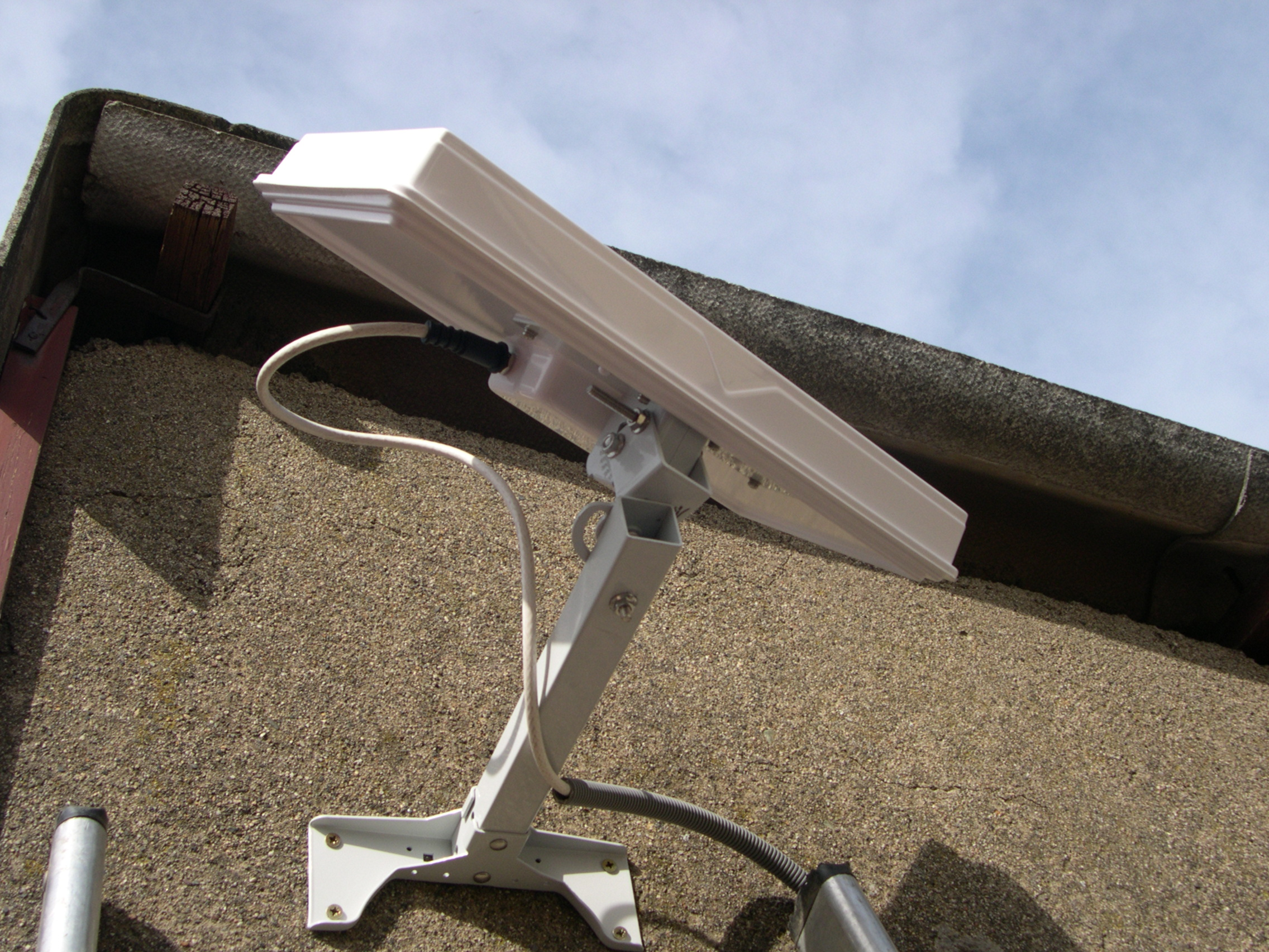 Antenne plate pour TV par satellite